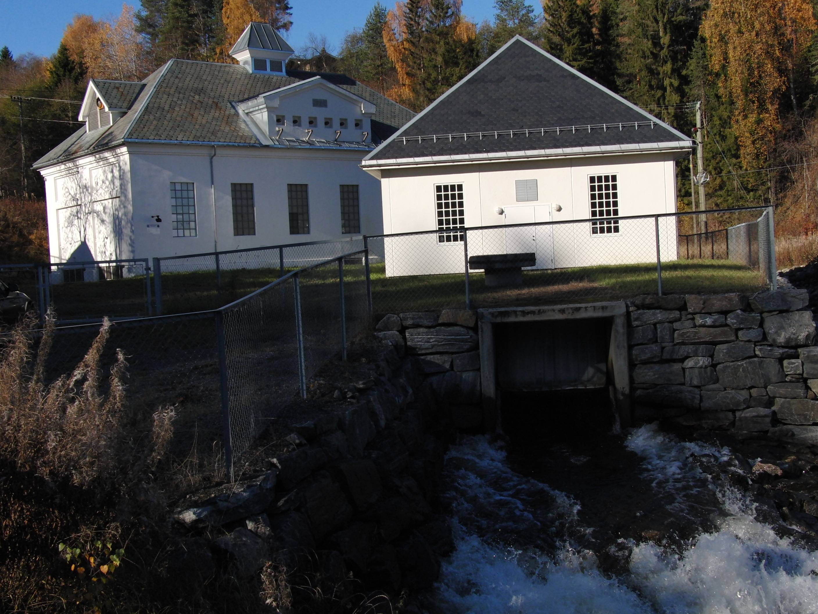 Åvella kraftverk